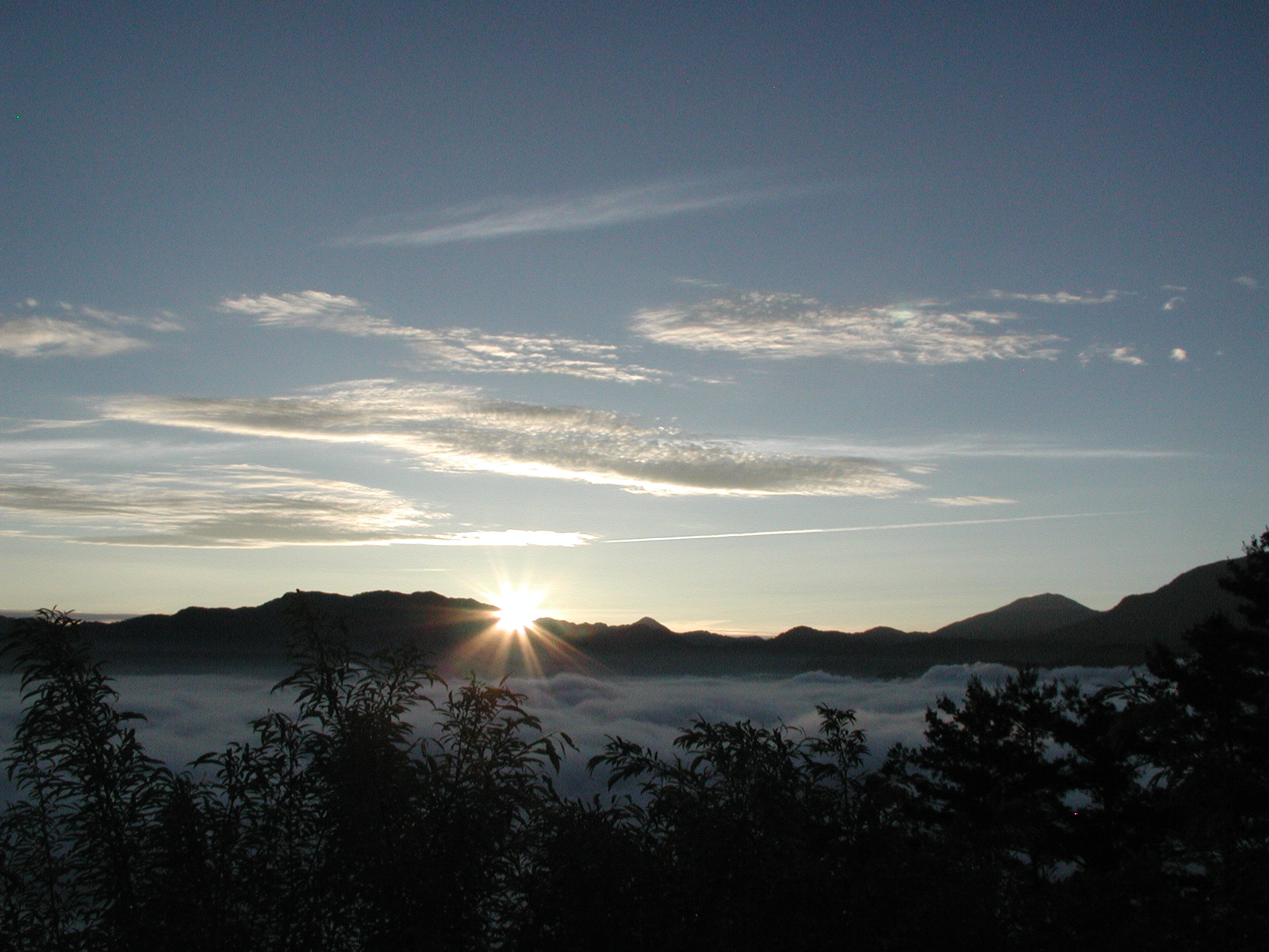 Sun will rise again